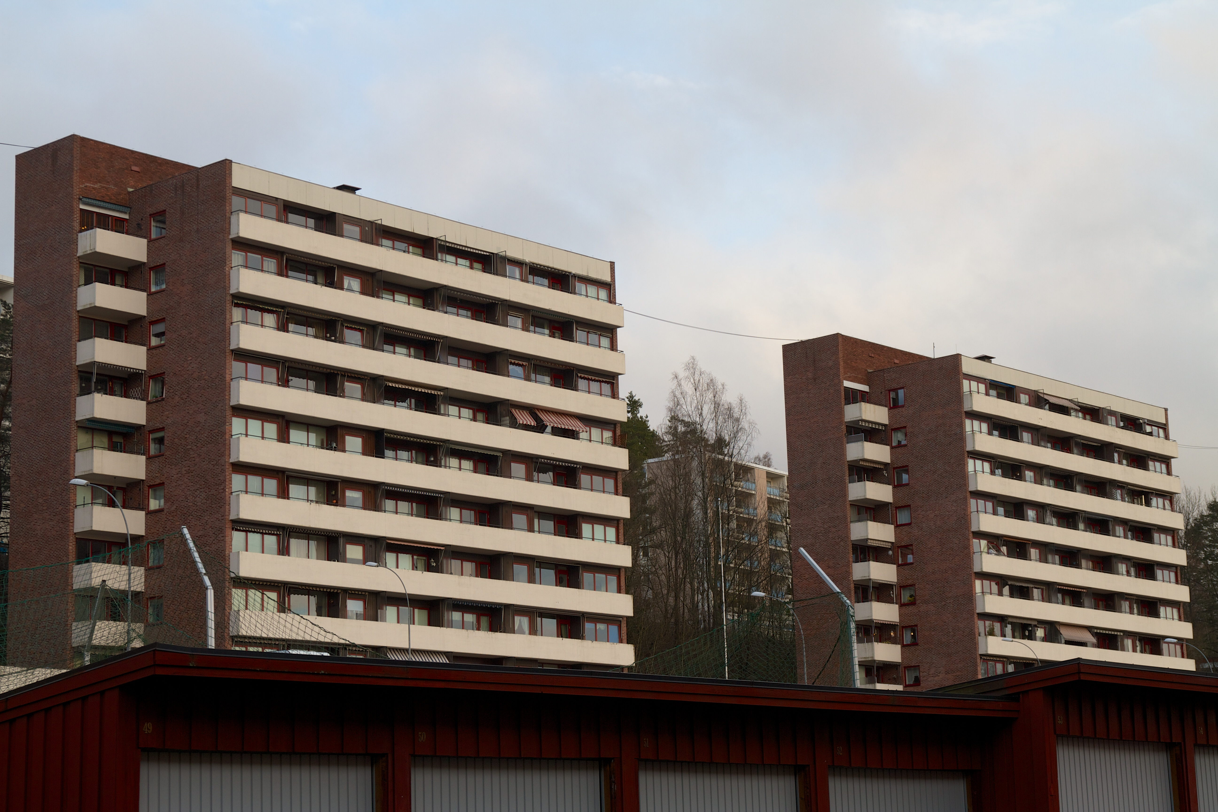 Stallerudveien på Bogerud i Oslo.